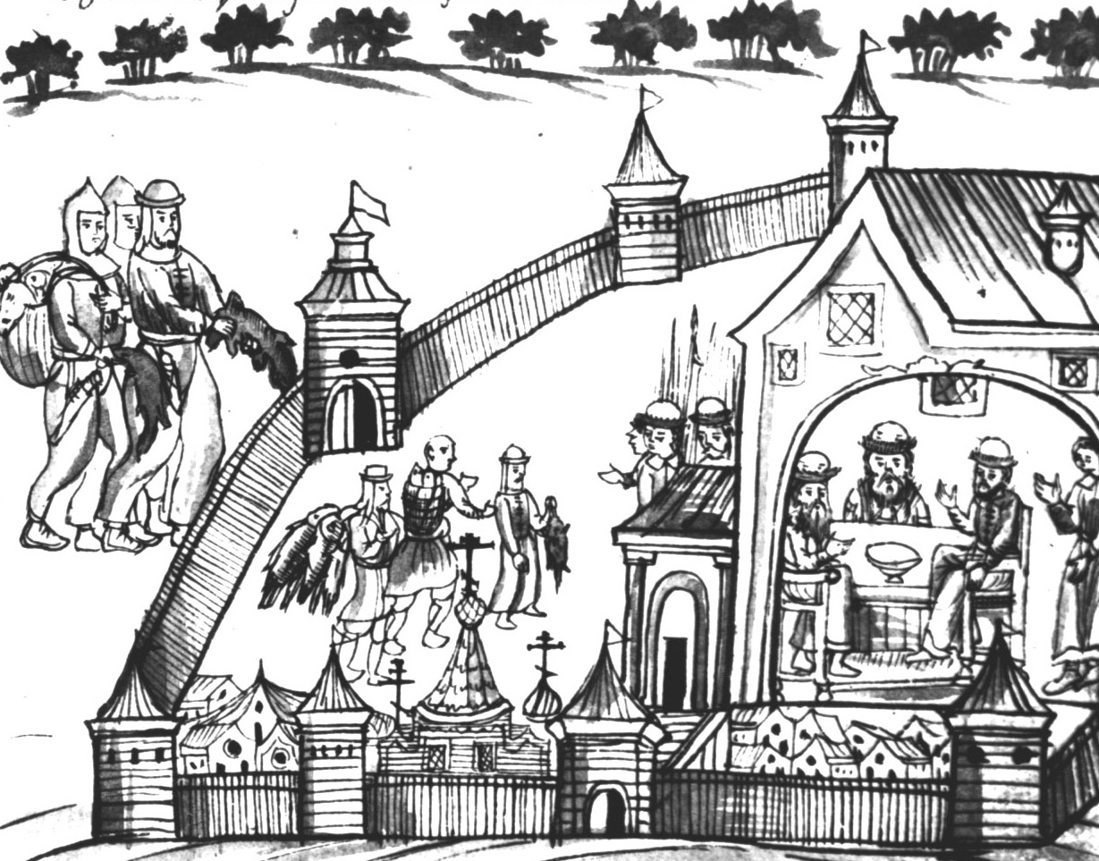 Московские воеводы в новопоставленном городе Тюмени